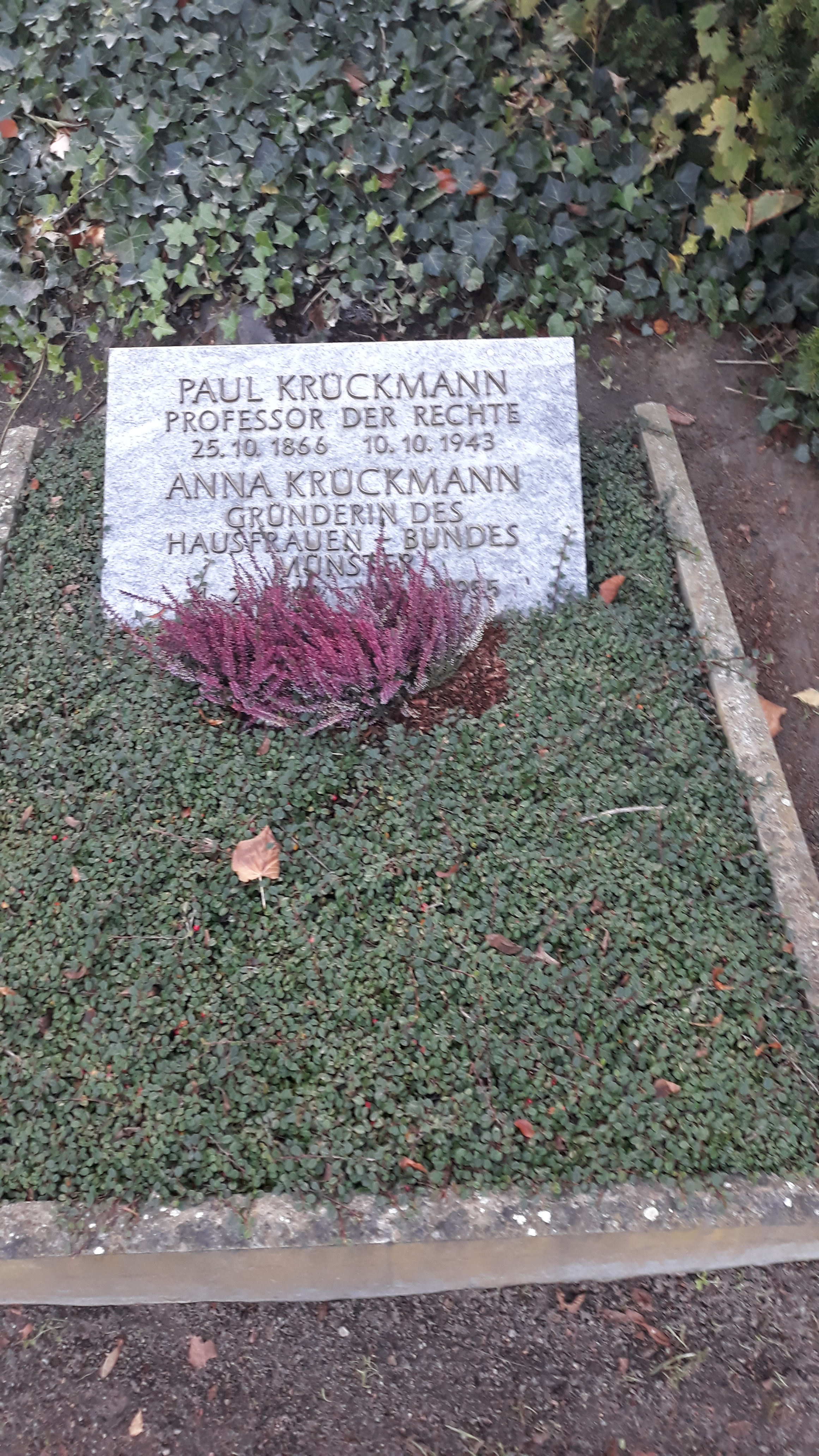 Das Grab des deutschen Juristen Paul Krückmann und seiner Ehefrau Anna auf dem Zentralfriedhof Münster.